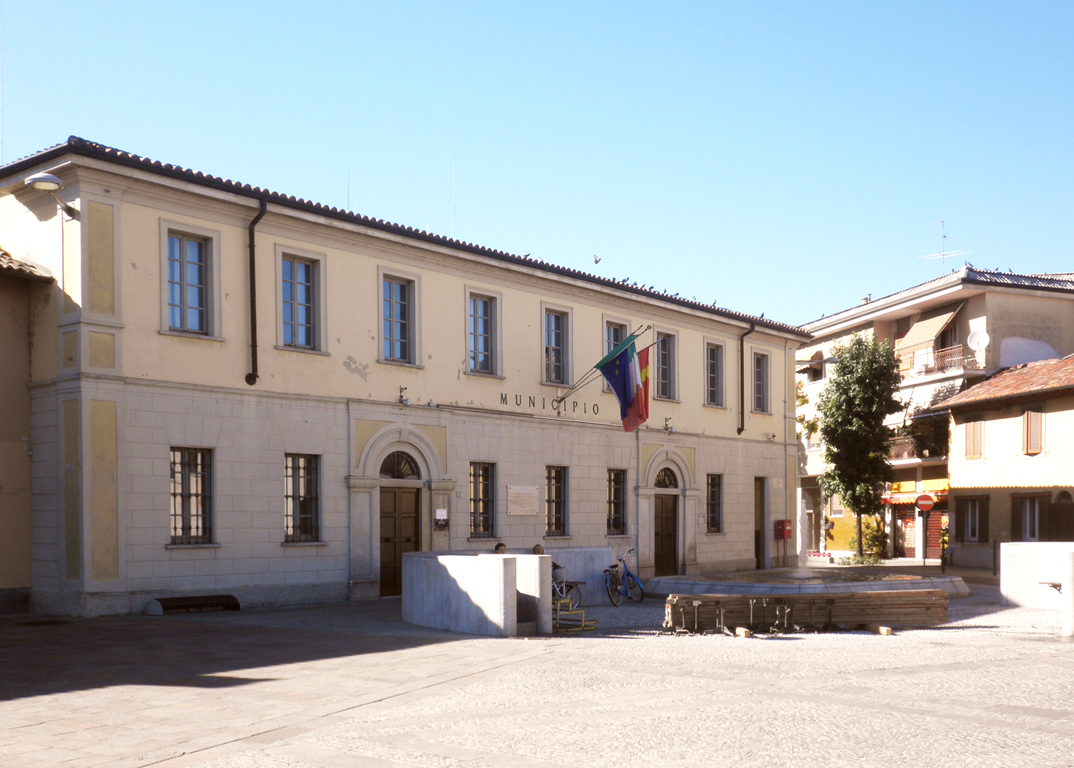 Municipio di Lodi Vecchio